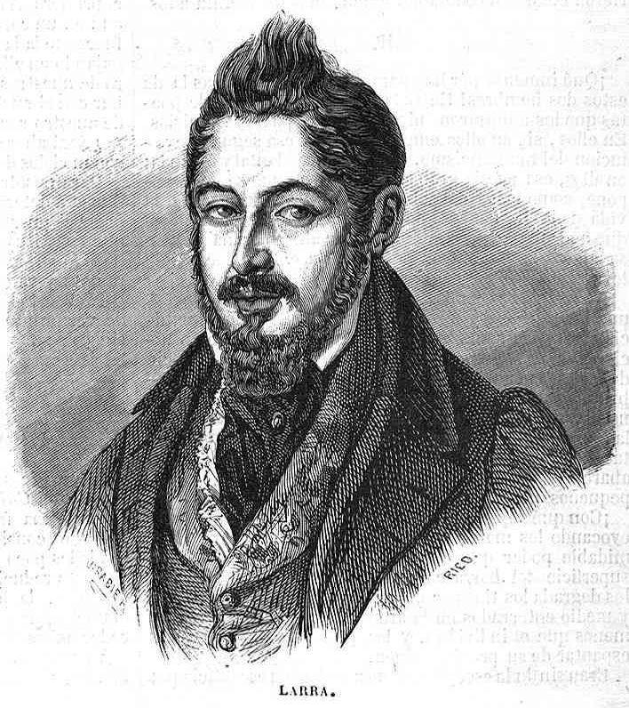 Mariano José de Larra, en la revista española El Museo Universal.